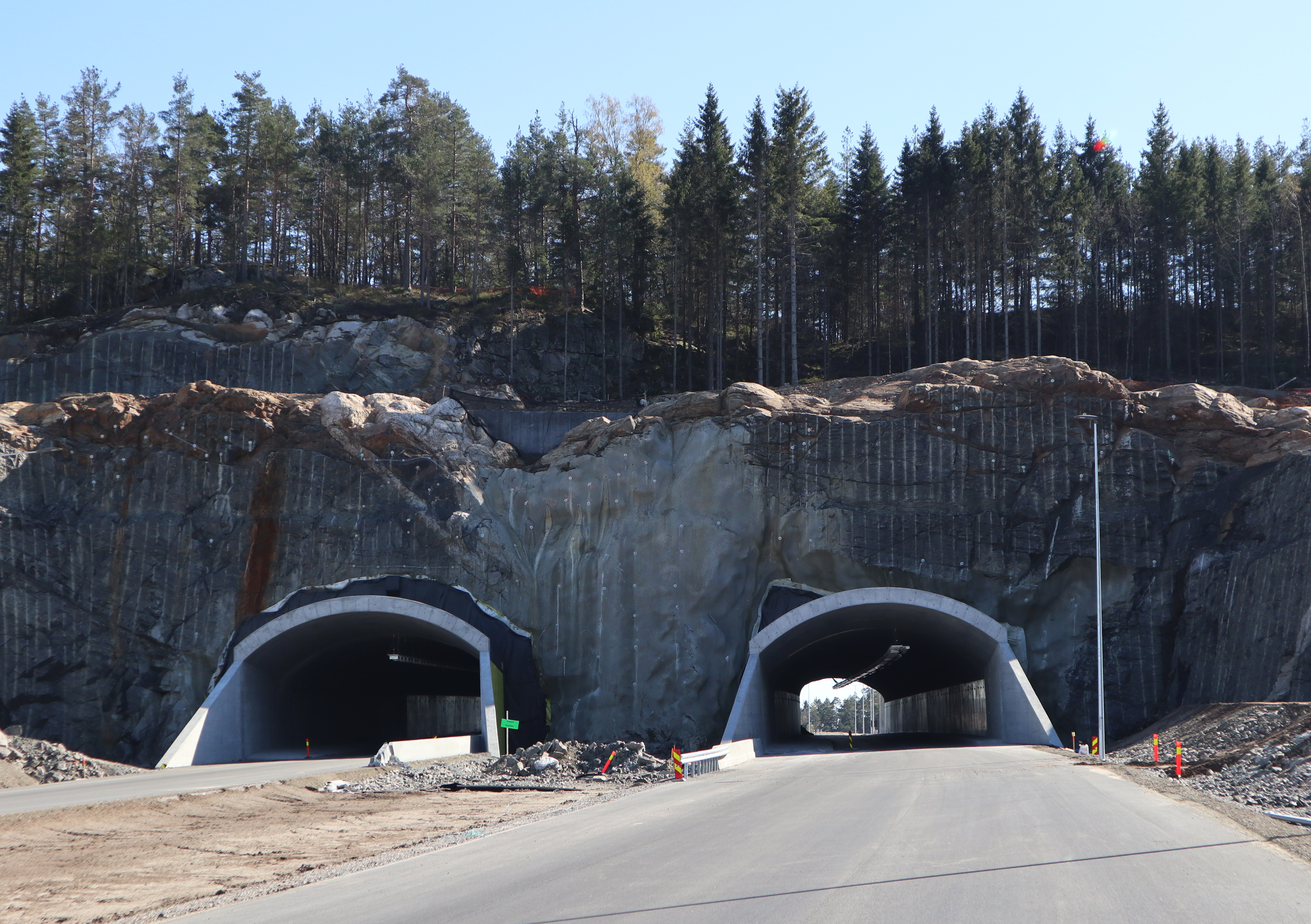 Træfjelltunnelen. Tunnelåpning mot øst. April 2019.